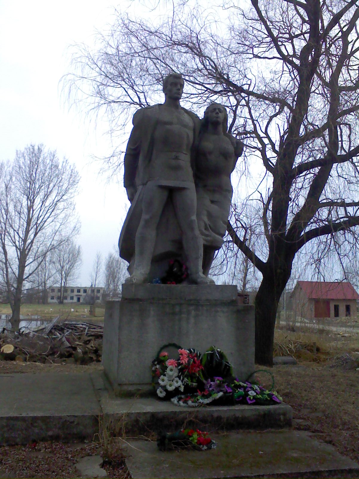 пам’ятник Невідомому солдату